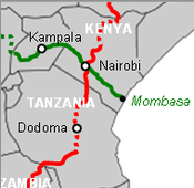 A Kelet-afrikai Közösség (EAC) területén áthaladó nemzetközi utak.